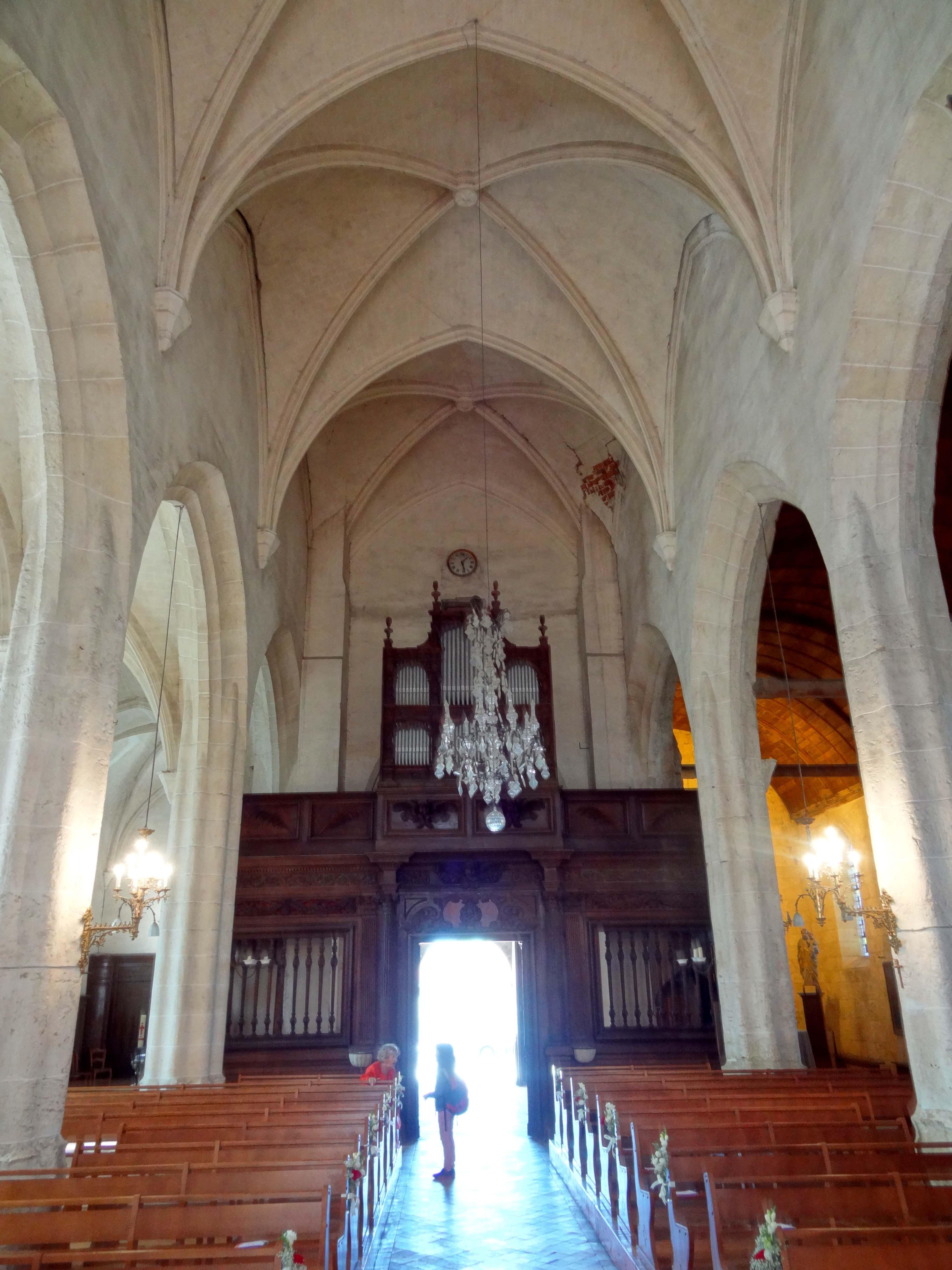 Intérieur de l'église - voir titre.